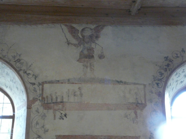 Kapelle Linsen Südwand Michael